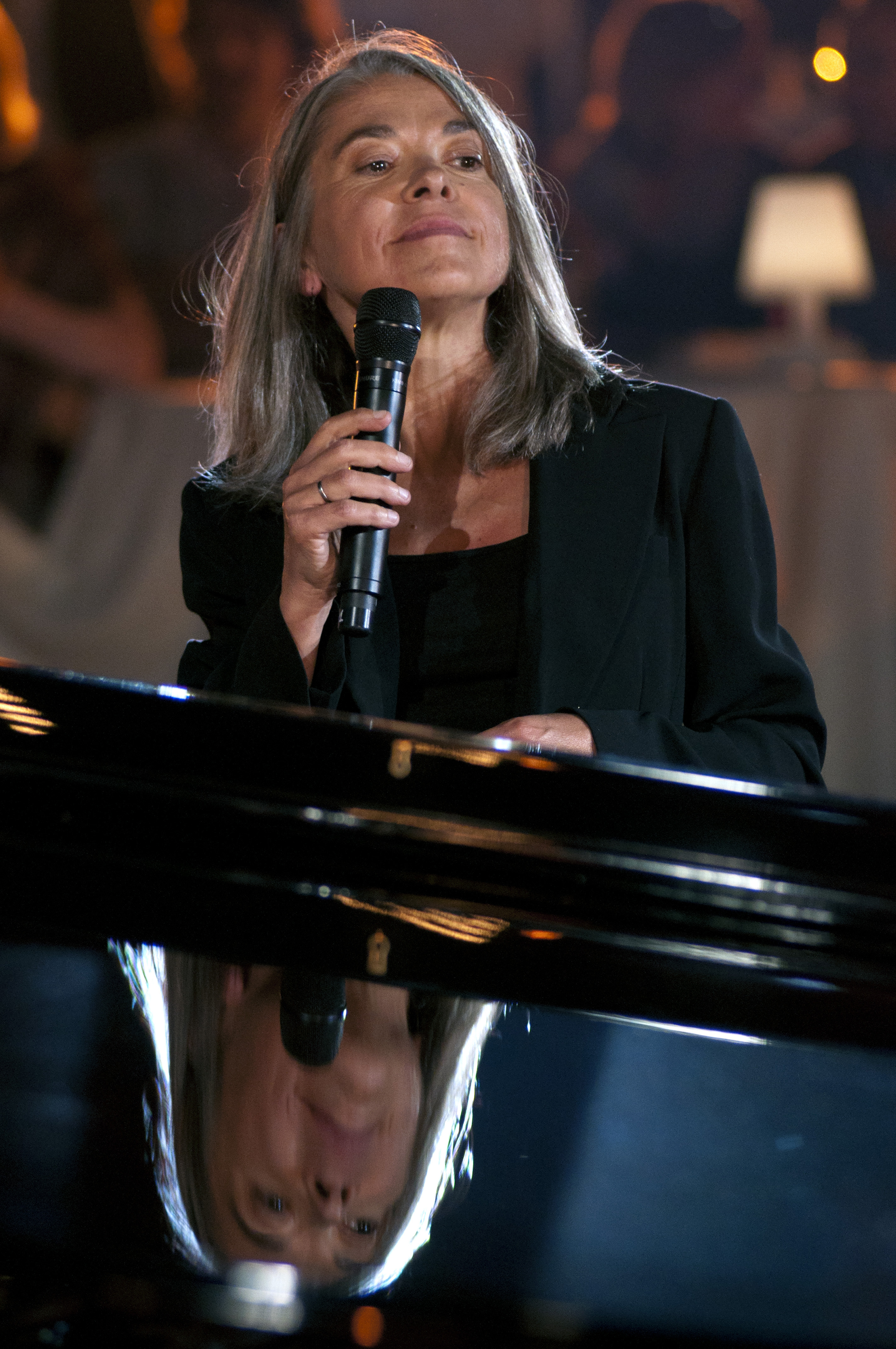 Portrait réalisé le 2011-09-29 à Nice au cours de l'enregistrement de l'émission "Les Victoires du Jazz" pour FR3